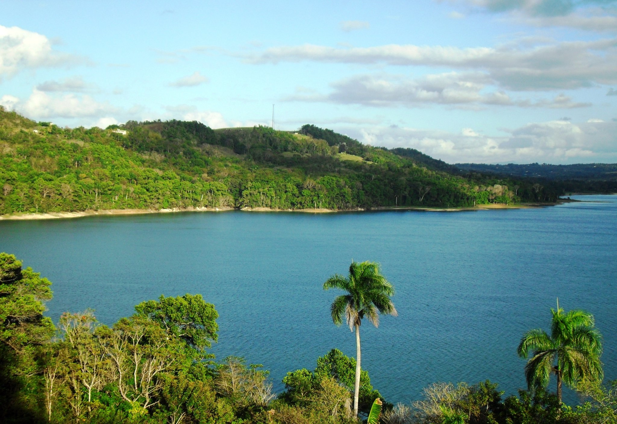 Lago Guajataca - Quebradillas, Puerto Rico